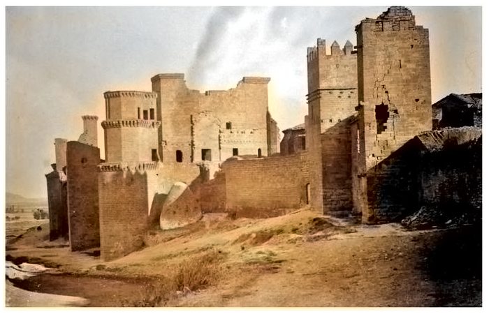 Palacio de los Teobaldos - Isidro Gil Gavilondo (Azkoitia 1843 - Burgos 1917) (